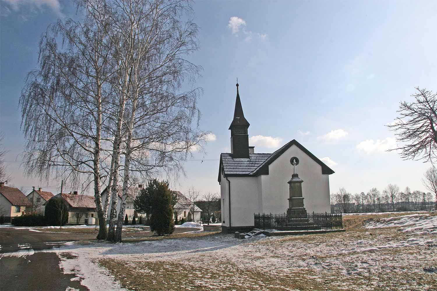 Česky: Požární zbrojnice a boží muka v obci Stéblová, okres Pardubice.